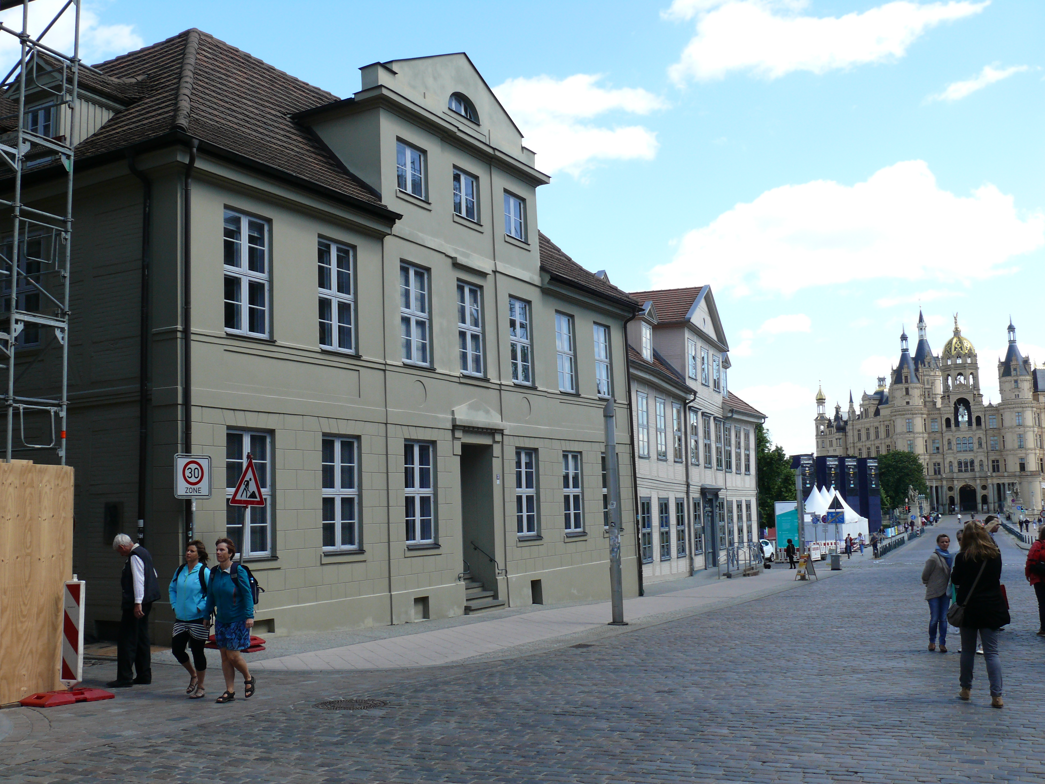 Die Gebäude "Schloßstraße 1 + 3 (links)" in Schwerin.